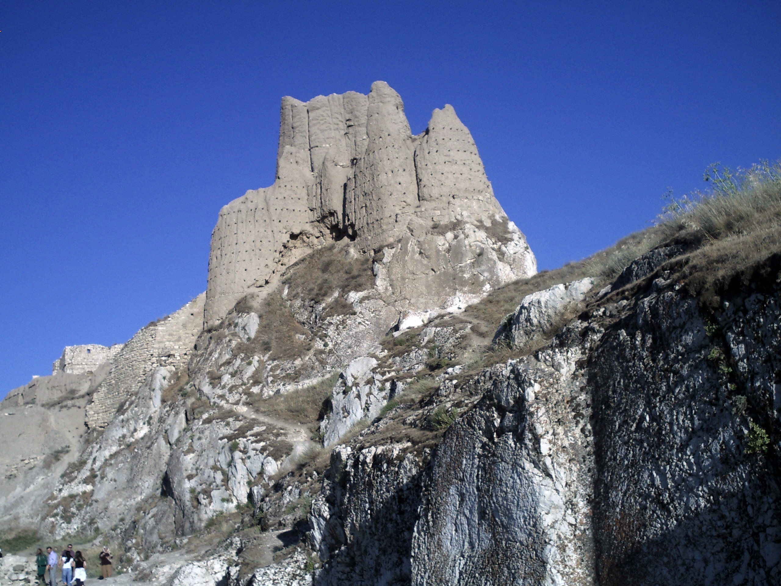 Merkez Kalesi (Van, Türkiye)